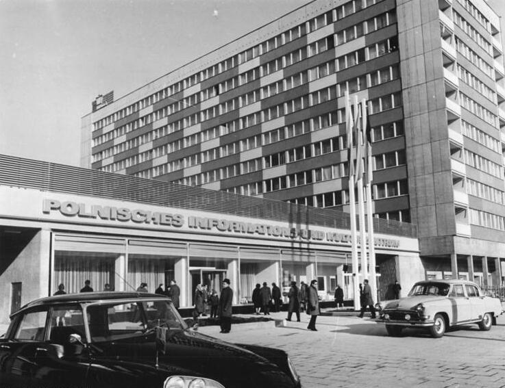 Leipzig, Informations- und Kulturzentrum Zentralbild Koch 7.2.69 Leipzig: Über ein attraktives Informations- und Kulturzentrum verfügt die befreundete Volksrepublik Polen in Leipzig. Dieses Haus der polnischen Kultur, das am 5.2.69 der Öffentlichkeit übergeben wurde, wird vor allem zur Messezeit Besucher und Gäste anziehen.